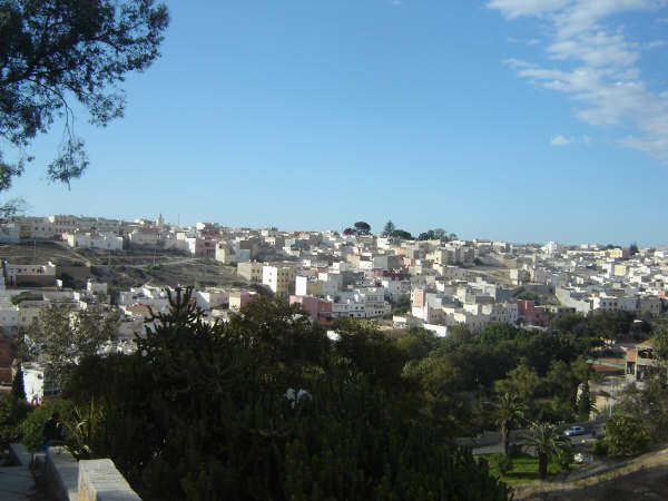 Biada, ancien quartier safiot, maisons construites sur une falaise.